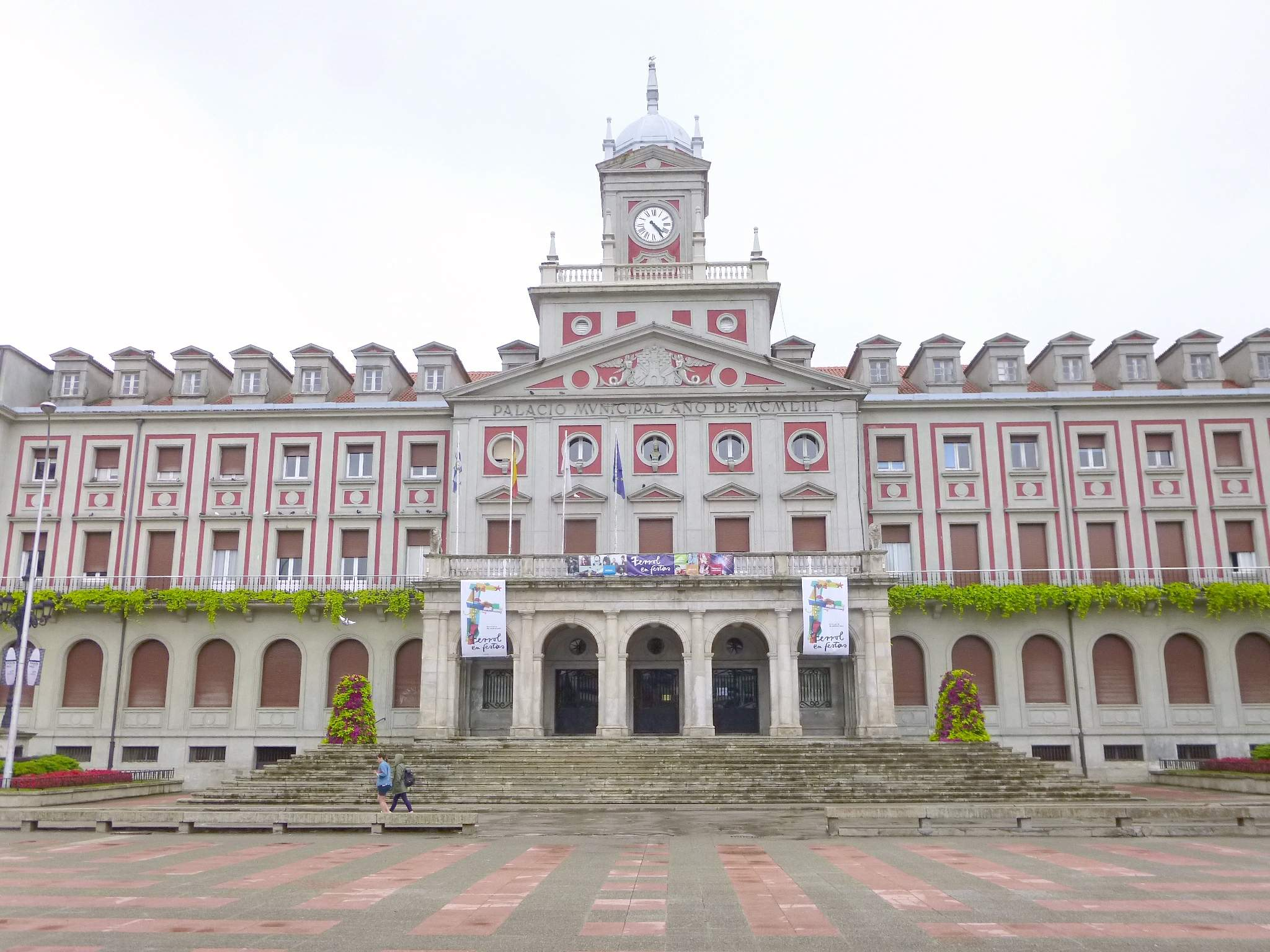 Ferrol - Barrio de La Magdalena - Plaza de Armas - Casa do Concello (Ayuntamiento)